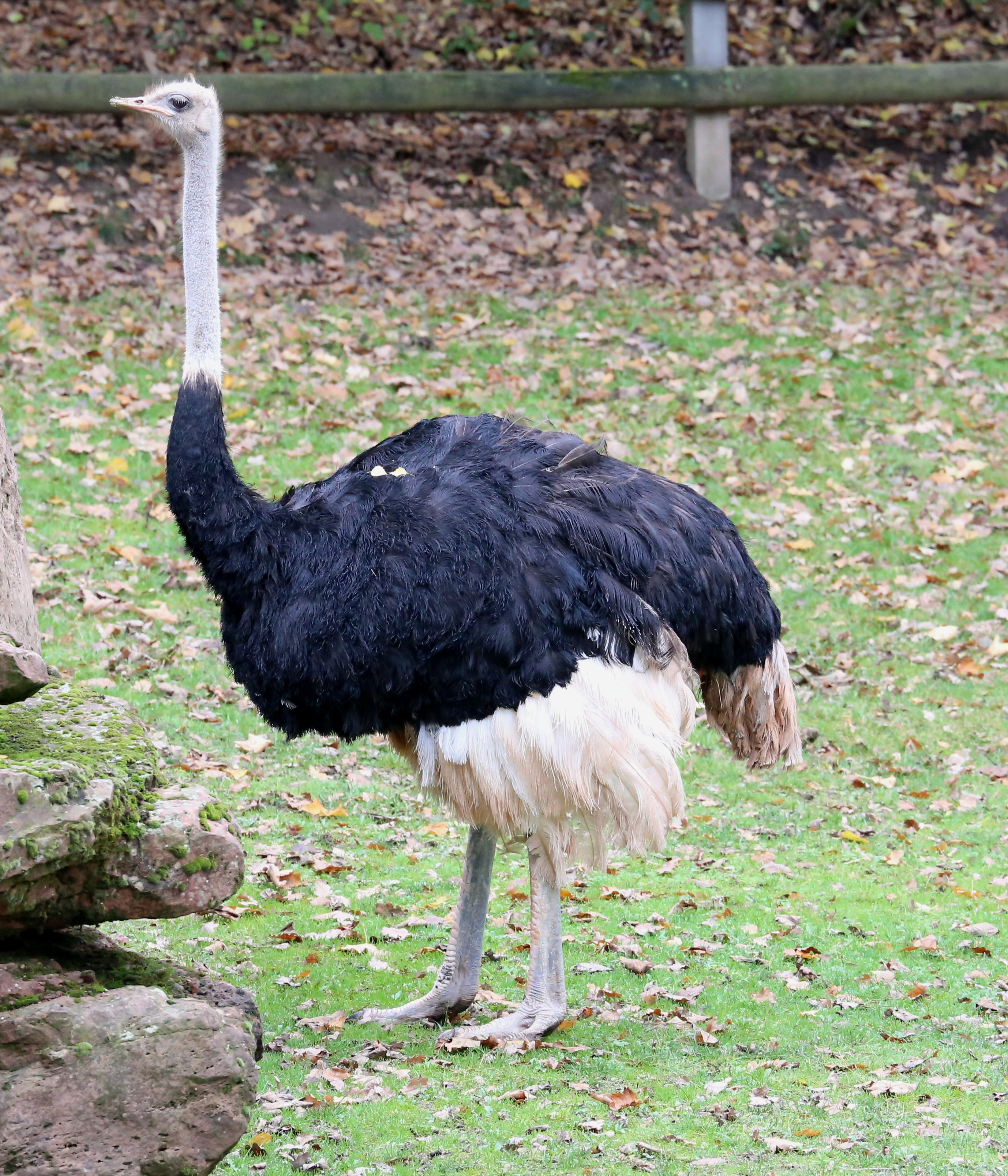 Blauhalsstrauß (Struthio camelus australis), Tiergarten Nürnberg